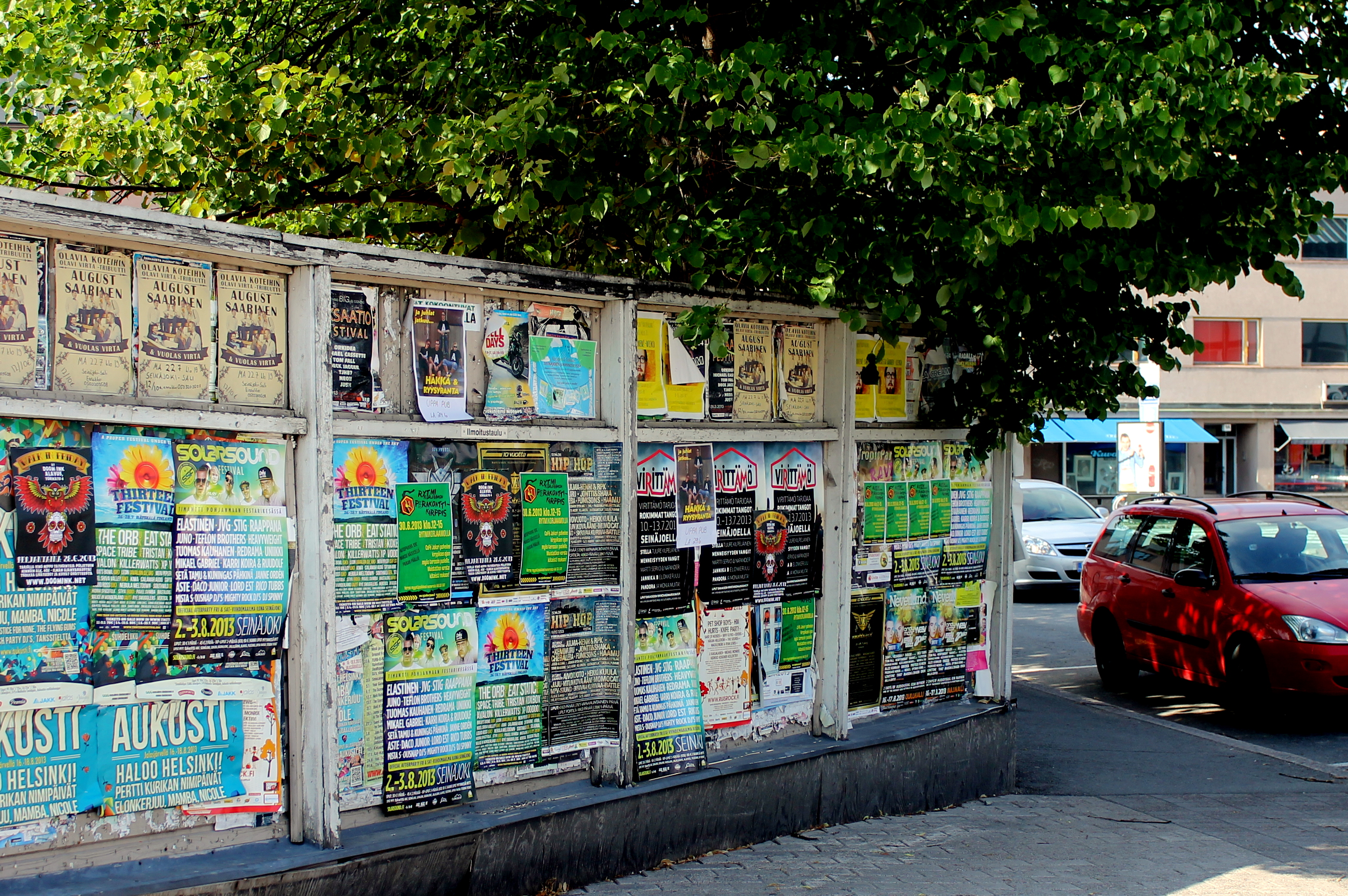 Mainostaulu Seinäjoen Torikeskuksessa